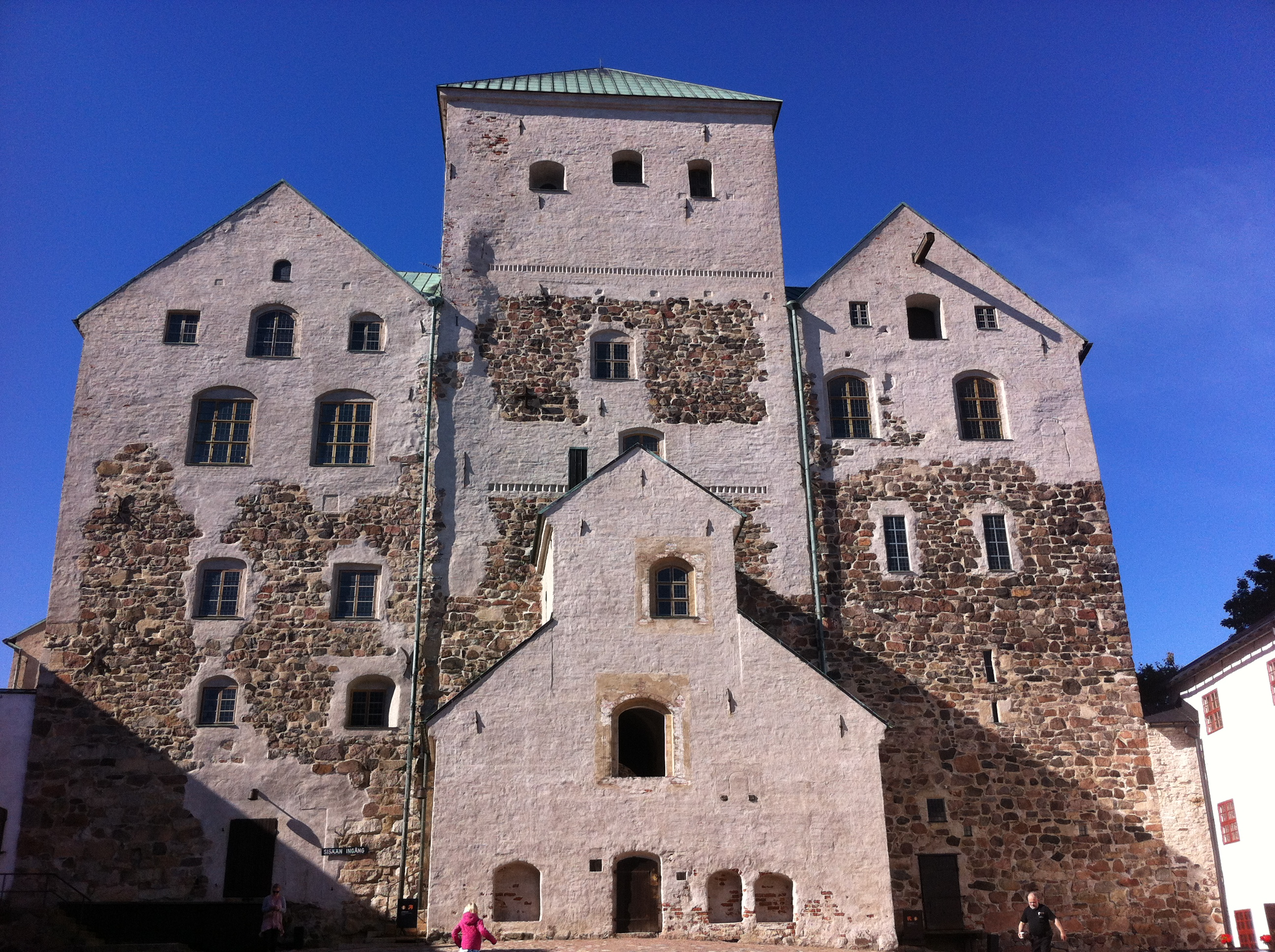 Turun linna 7. syyskuuta 2013